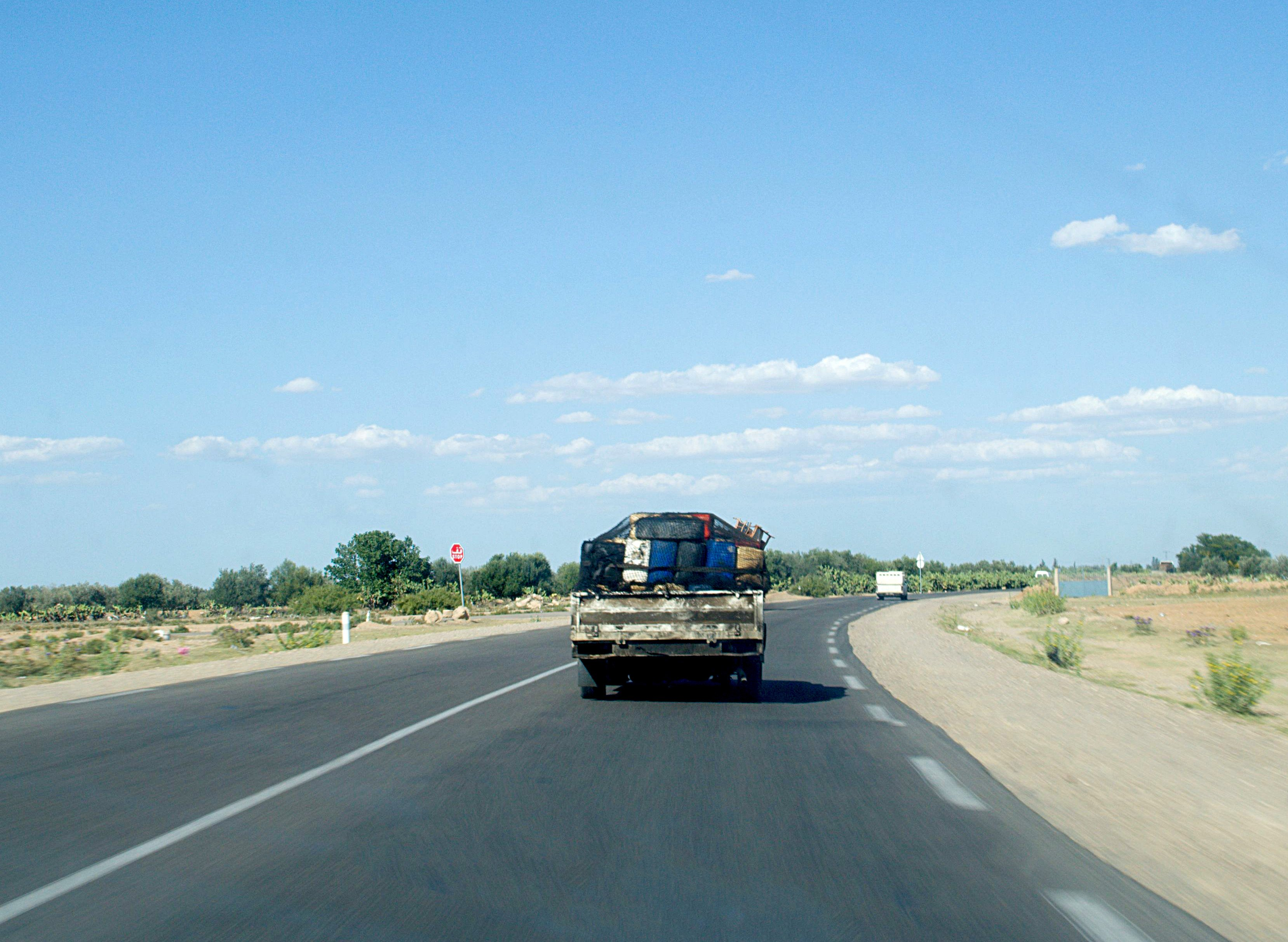 Véhicule transportant du carburant de contre-bande en Tunisie sur la route de El-Houareb, Kairouan